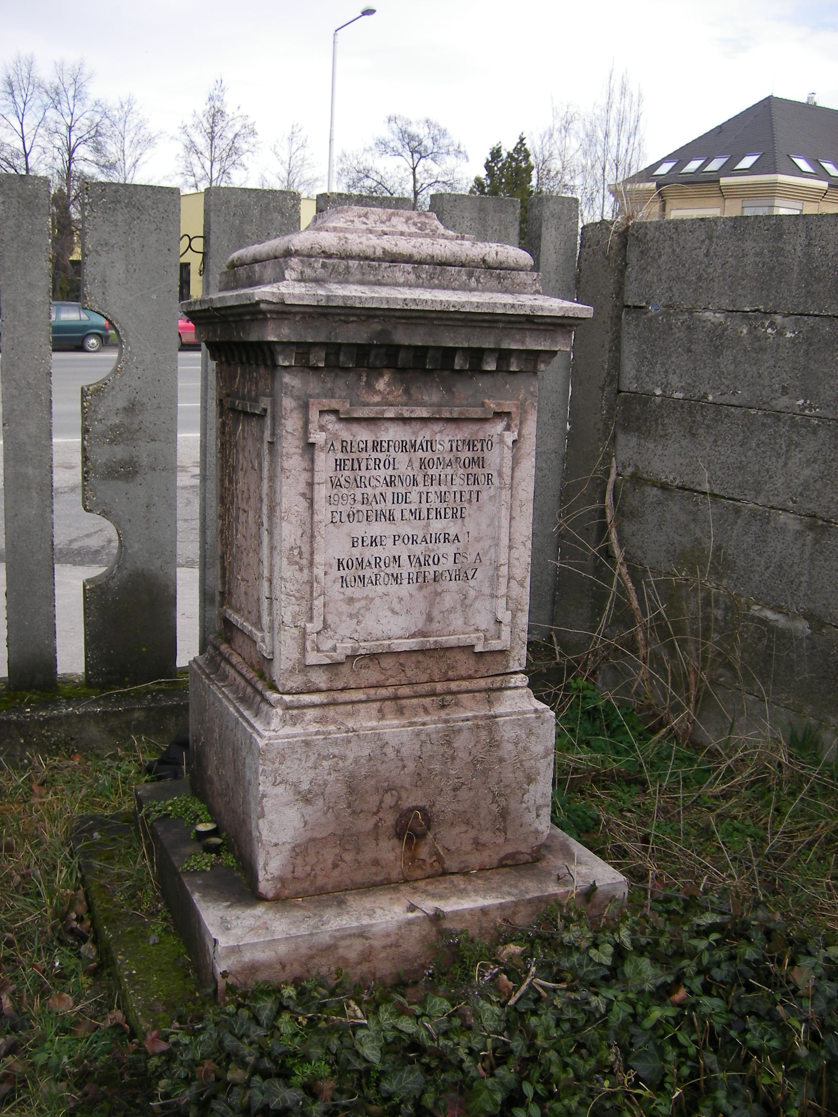 Komárom - Református temető, az régi temetőből áthozott sírok emlékműve